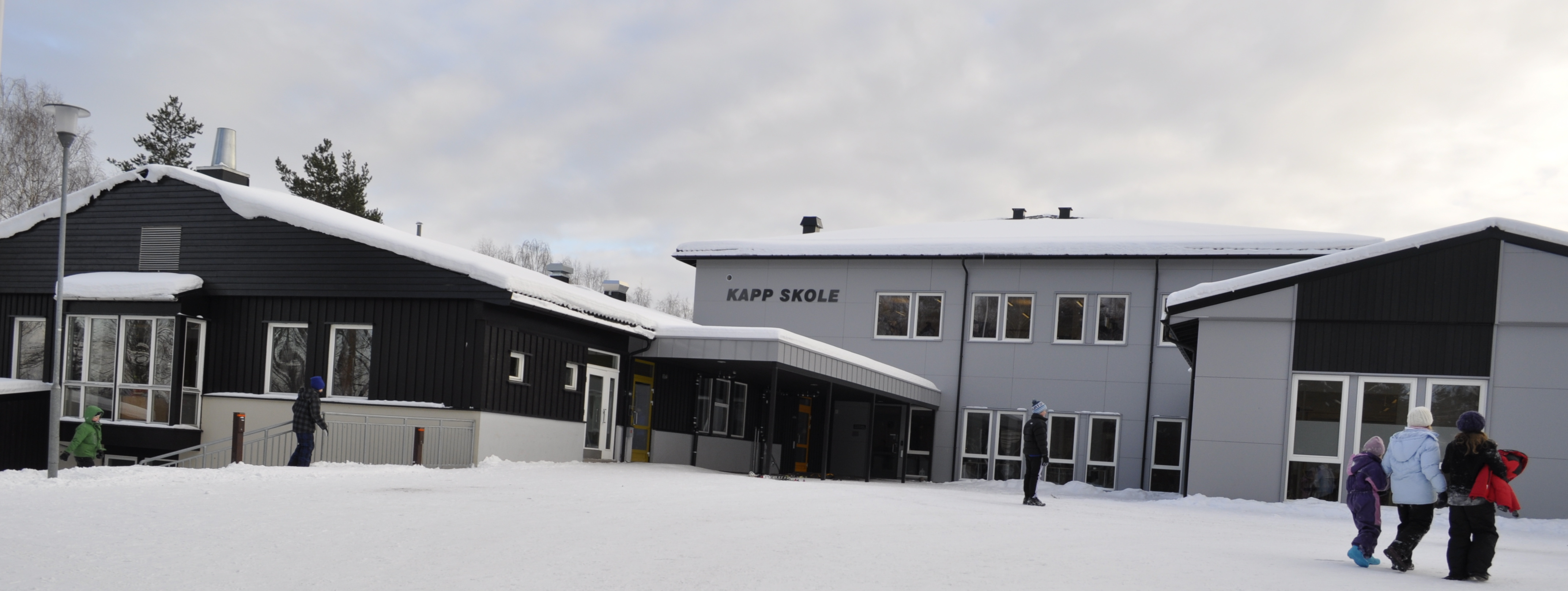 Barneskole på Kapp